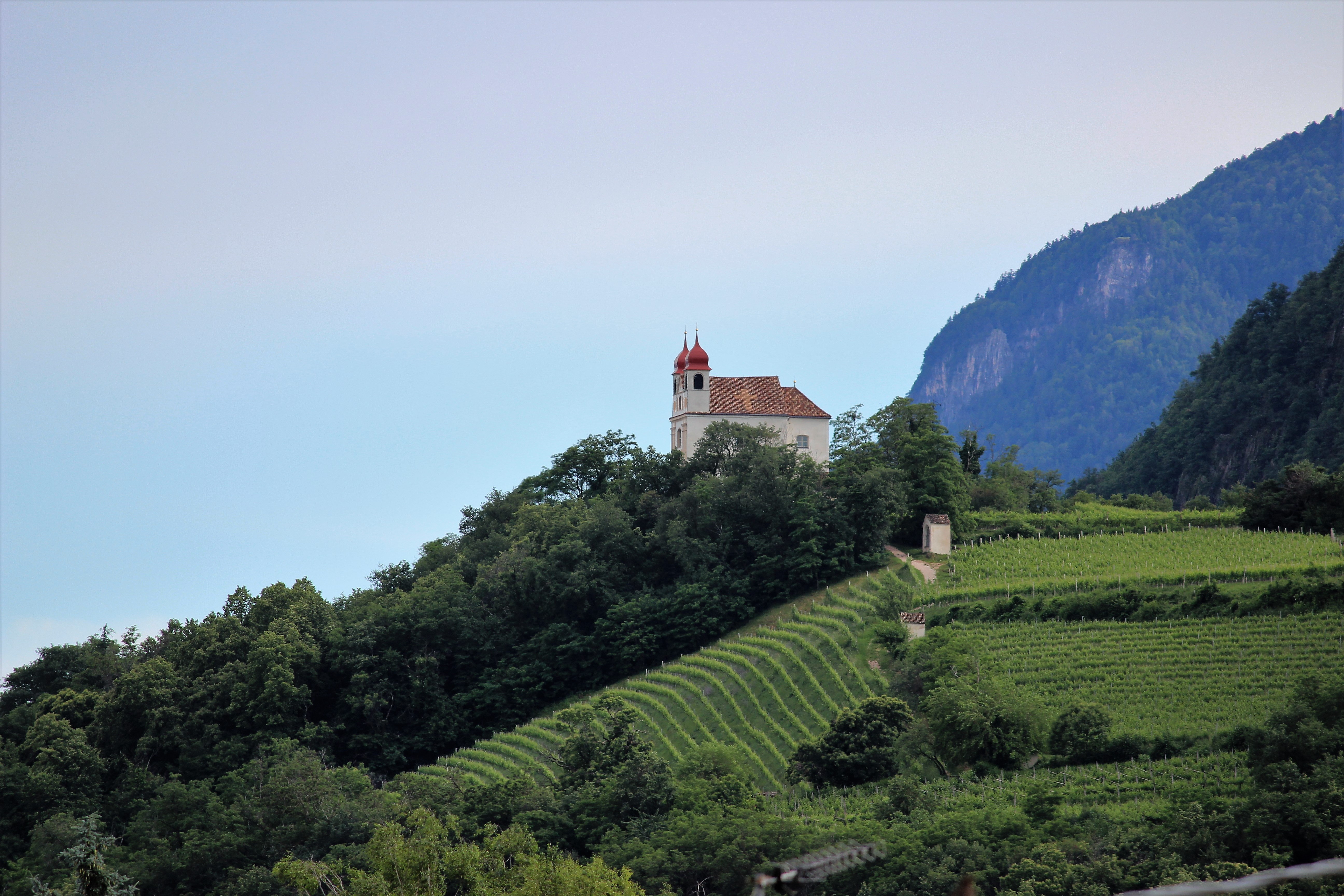 Heiligkreuzkirche auf der Gleif in Eppan